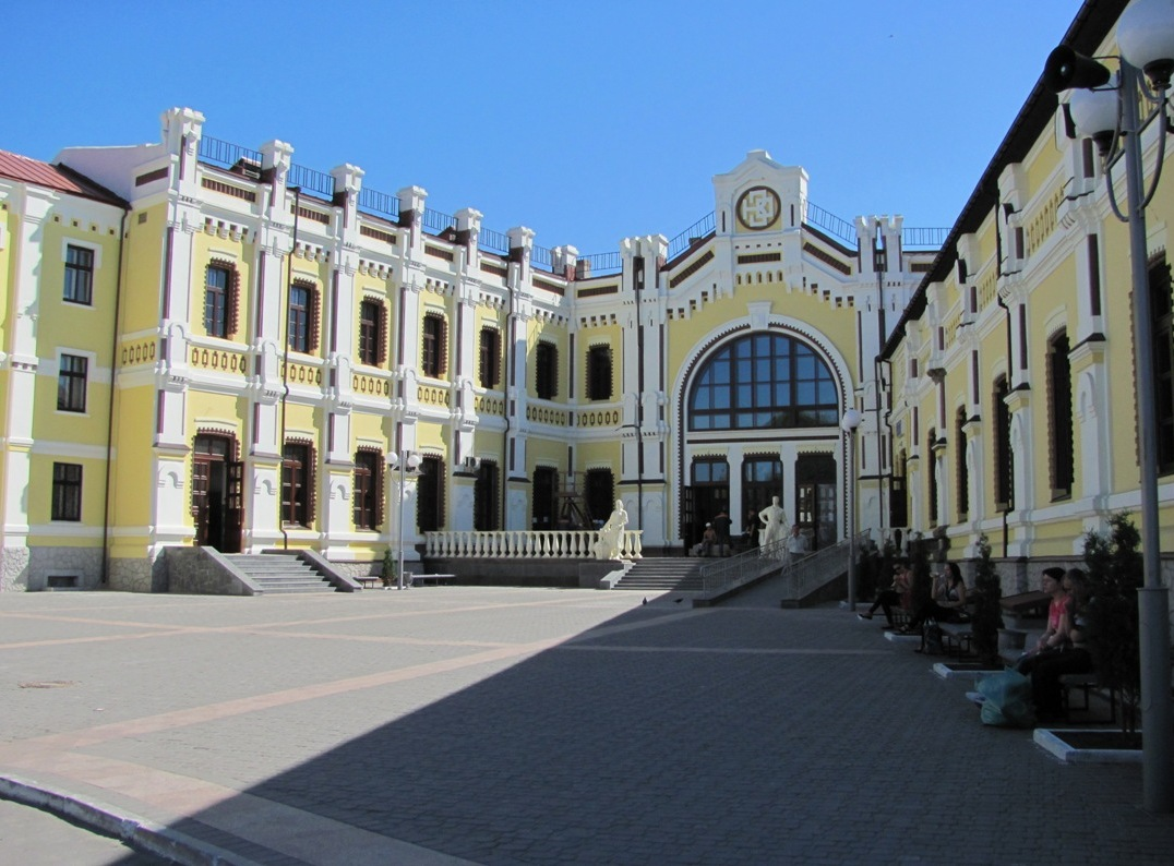 Вокзал ст. Казатин (построен в 1889 г. по проекту арх. Кобелева). Главный вход, привокзальная площадь.